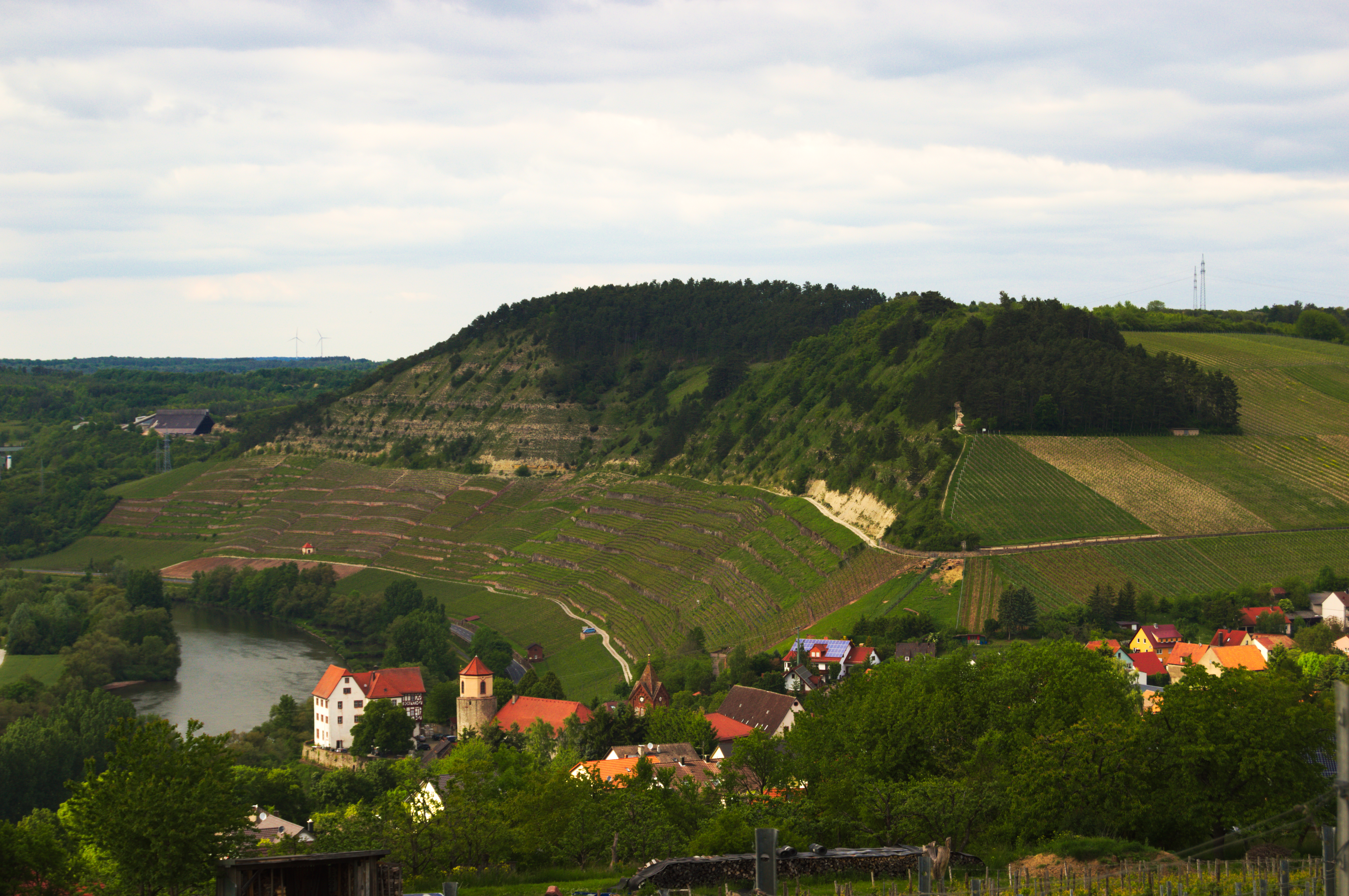 Aufnahme des Homburger Kallmuths von oberhalb der Weinberge, die sich über dem Dorf befinden. NSG „Kallmuth“ oberhalb der Weinlage.